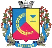 Герб города Северск (Донецкая область)